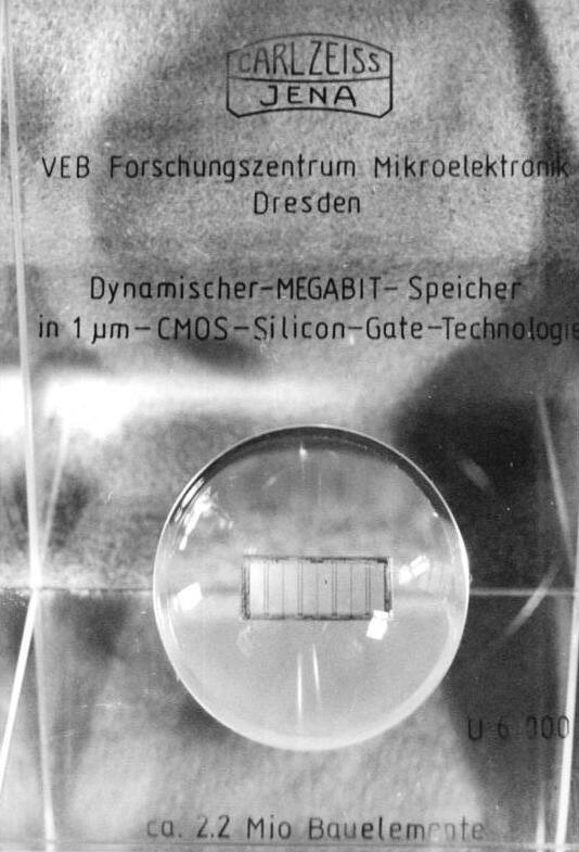 VEB Carl Zeiss Jena, 1-Megabit-Chip ADN-ZB Settnik 12.9.1988 Berlin: Chipübergabe- Muster von einem der ersten in der DDR hergestellten 1-Megabit-Speicherschaltkreise, das dem Generalsekretär des ZK der SED und Vorsitzenden des Staatsrates der DDR, Erich Honecker, von einem Kollektiv des Kombinates Carl Zeiss Jena übergeben wurde. - siehe dazu ADN-Meldungen "Übergabe 1-Megabit-Speicherschaltkreis" sowie "Gesprächsrunde im Anschluss an die Chipübergabe"